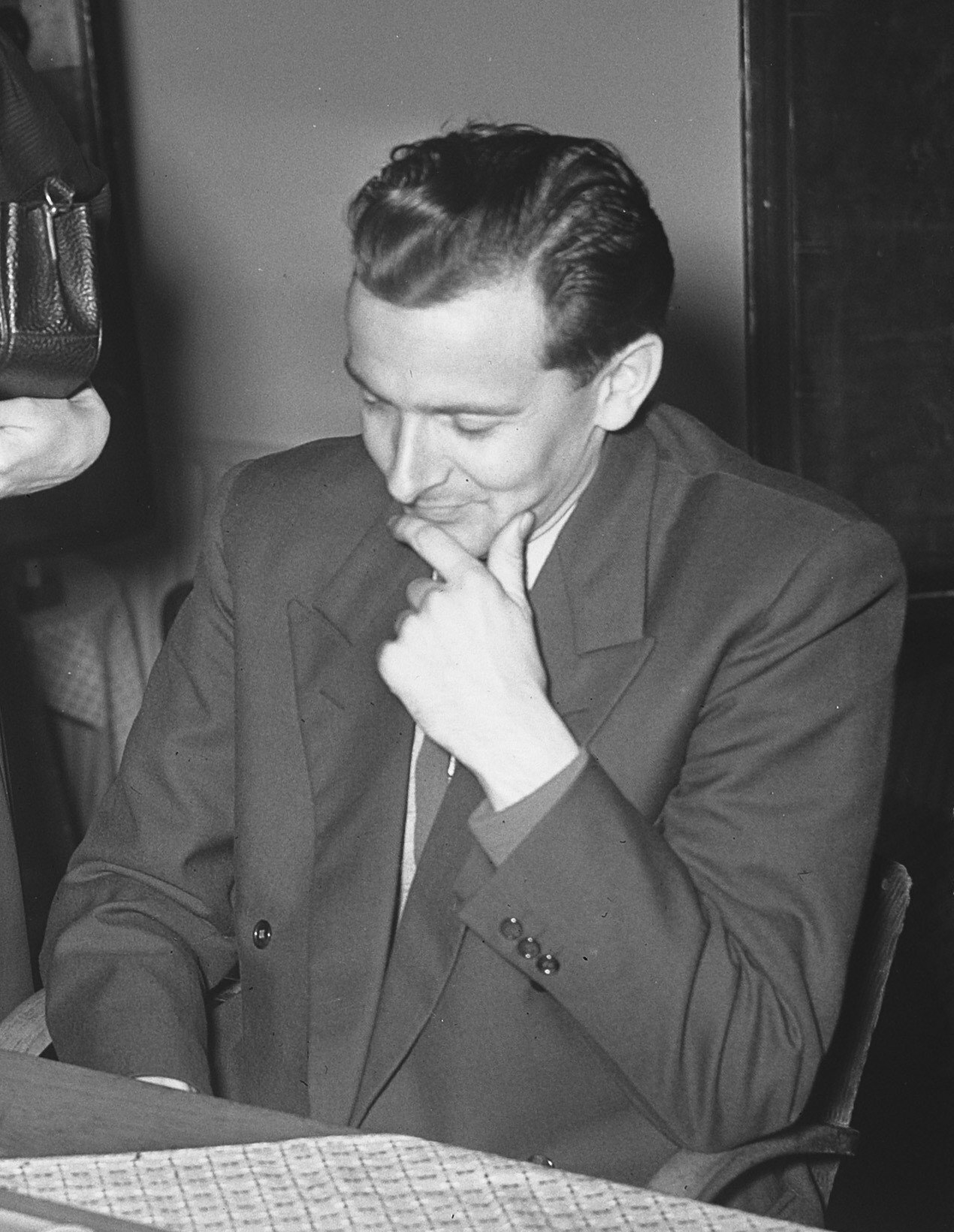 Wereldkampioenschappen dammen Hilversum, Geertje Wielema doet eerste zet